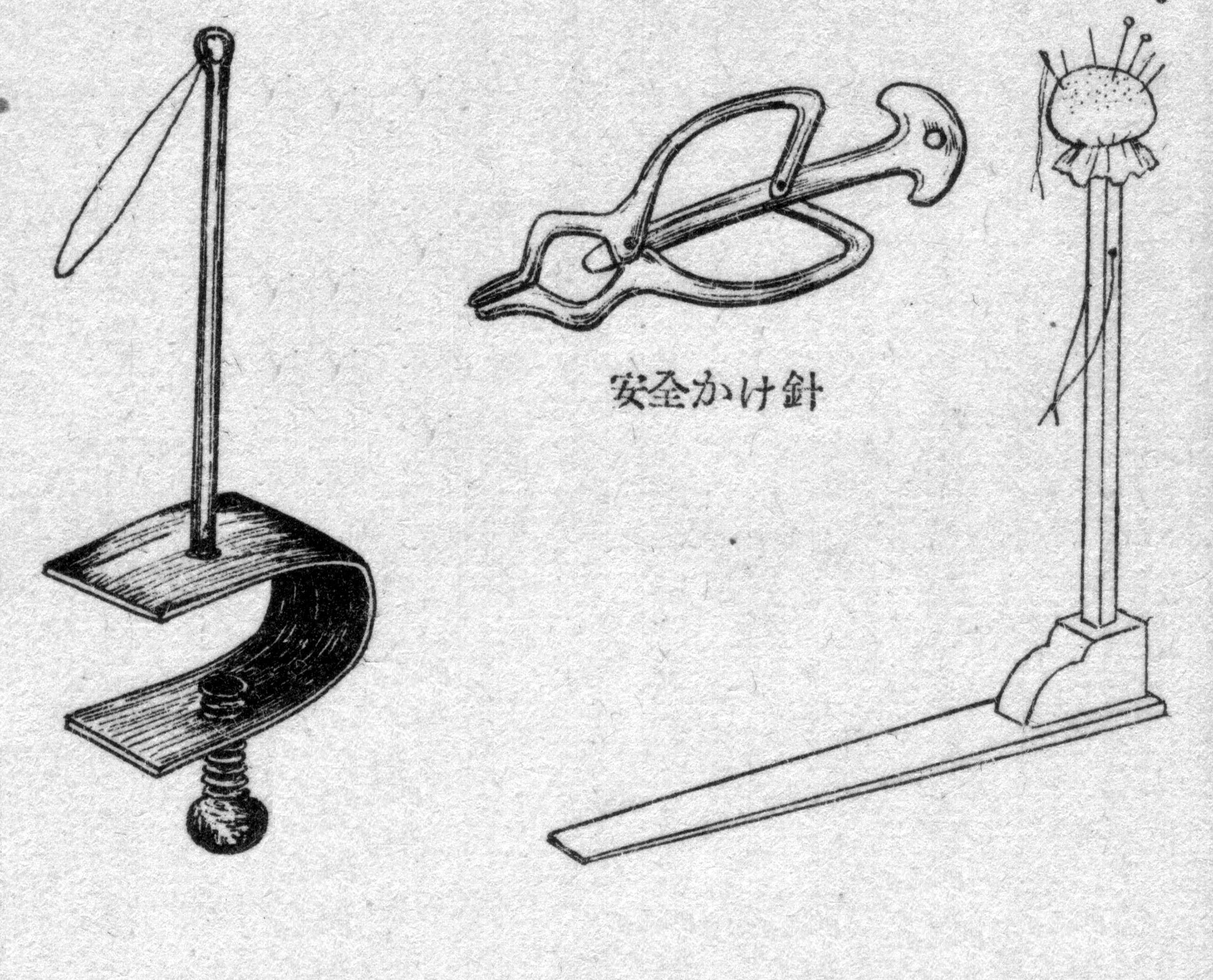 絎台(Kukedai)